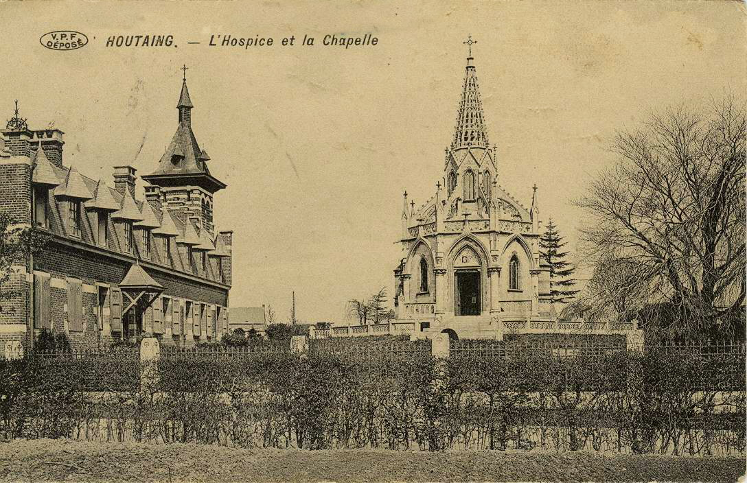 Le Mausolée d'Houtaing